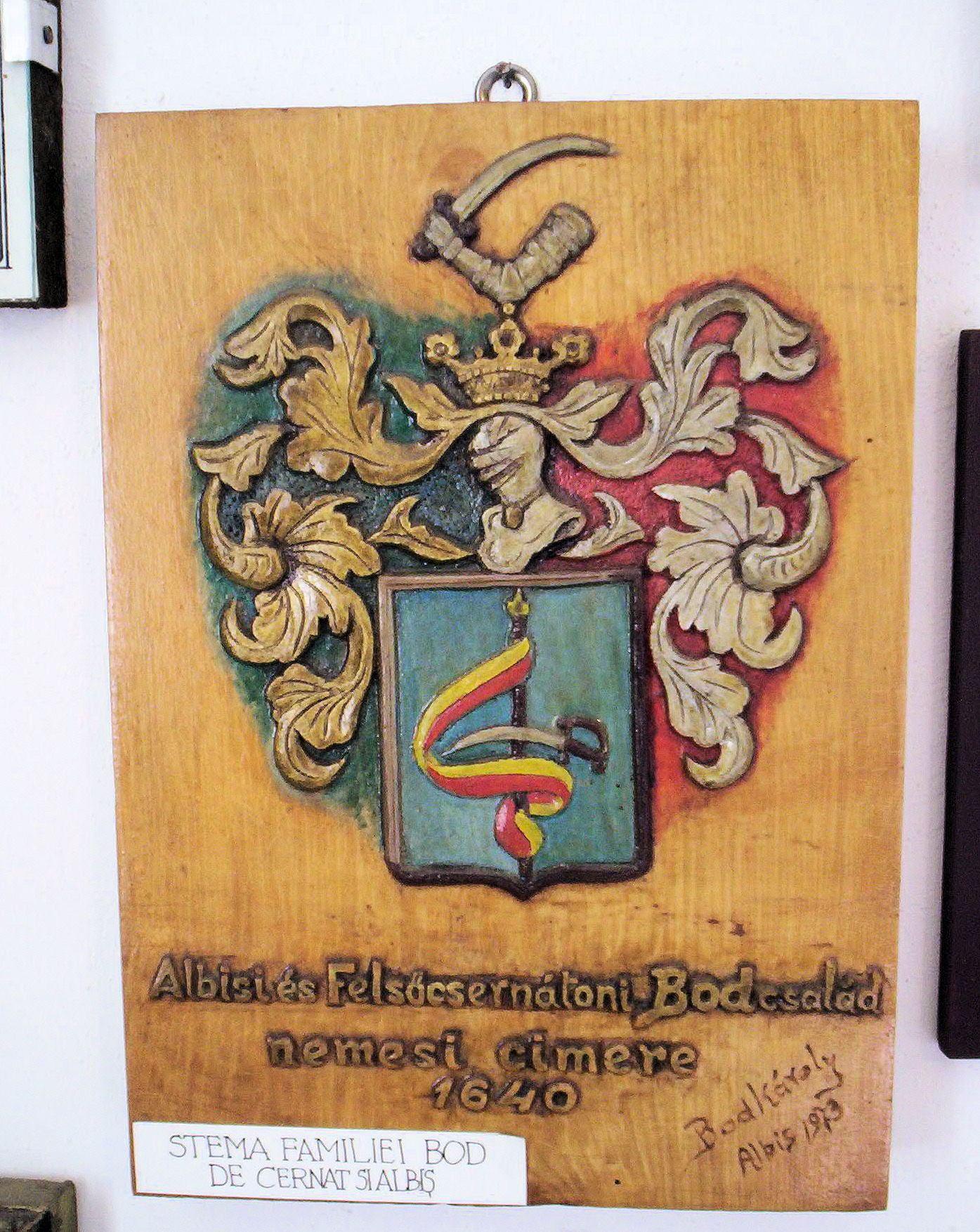 A Bod család nemesi címere (Haszmann Pál Néprajzi Múzeum, Csernáton) – photo taken by uploader User:Csanády in 2006.